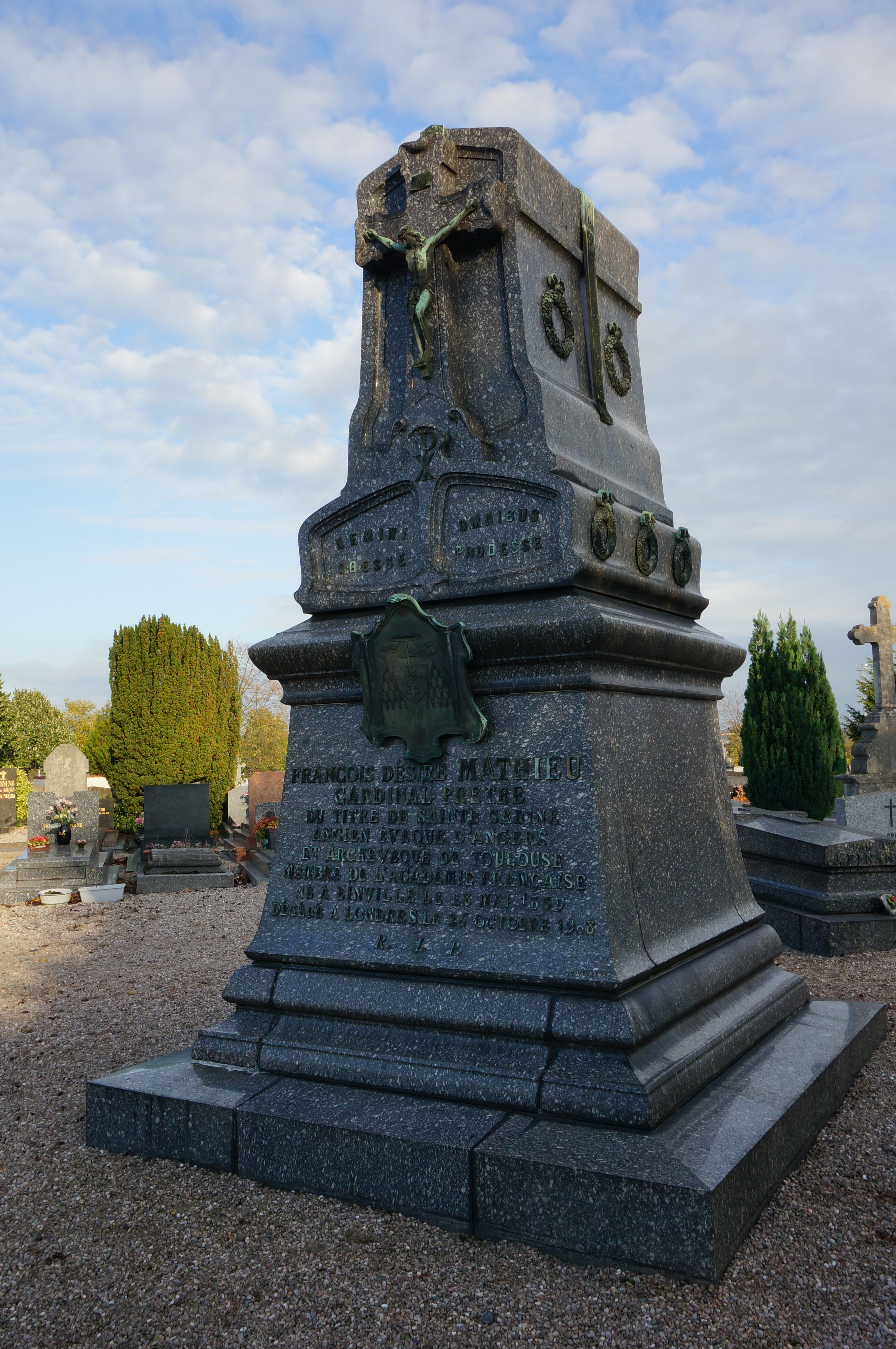 Tombeau du Cardinal Mathieu au cimetière du Sud à Nancy (Lorraine).